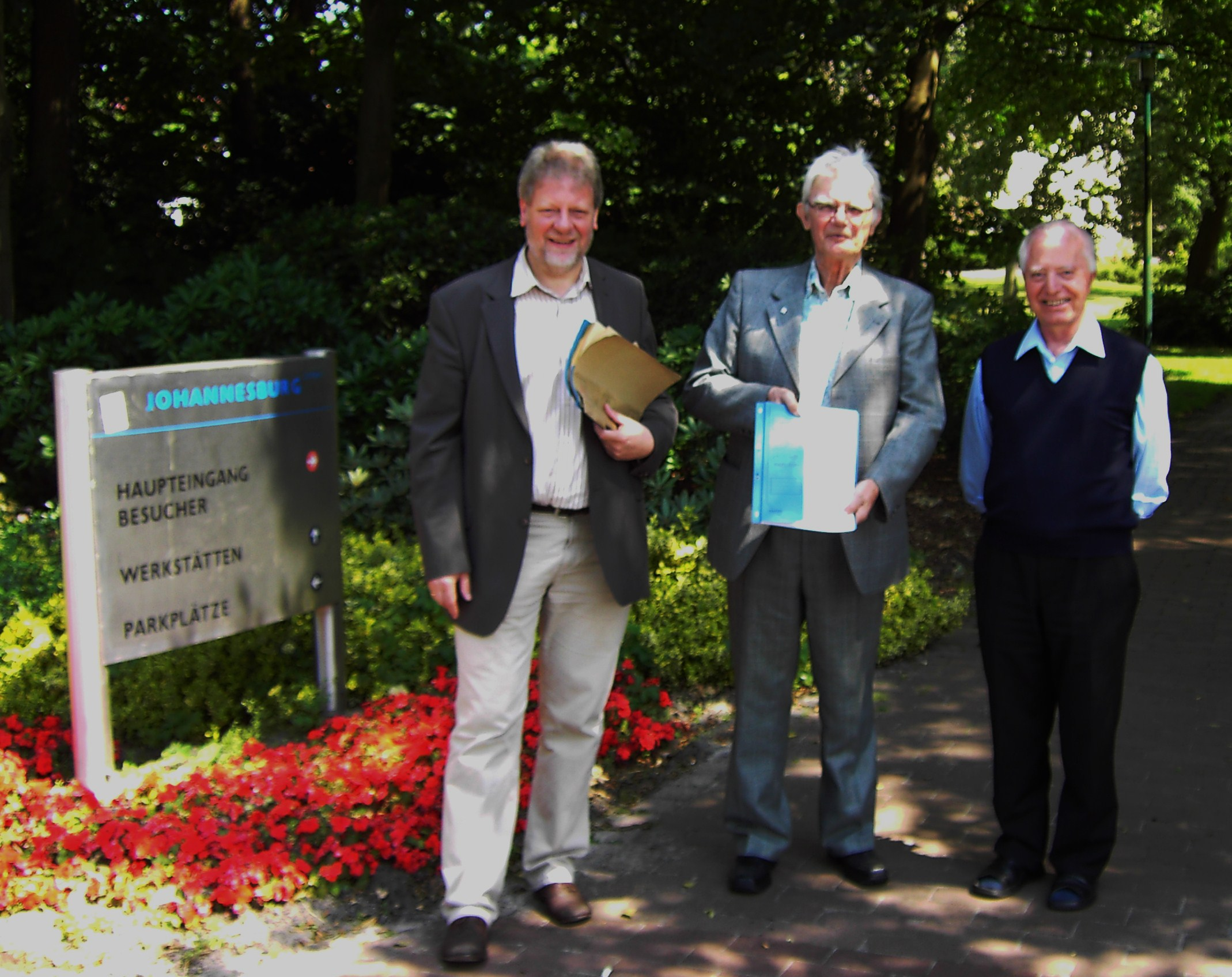 Aktenübergabe in der Jugendhilfe Johannesburg am 25. Juni 2009 an den 77jährigen Josef Dorsten mit dem Geschäftsführer Richard Klein und Ordensbruder Köster